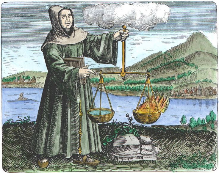 Illustrazione ripresa da Michael Maier Symbola aureae mensae duodecim nationum, Francoforte, typis Antonij Hummij, 1617, pagina 450: Ruggero Bacone in abiti francescani bilancia gli elementi del fuoco e dell'acqua.